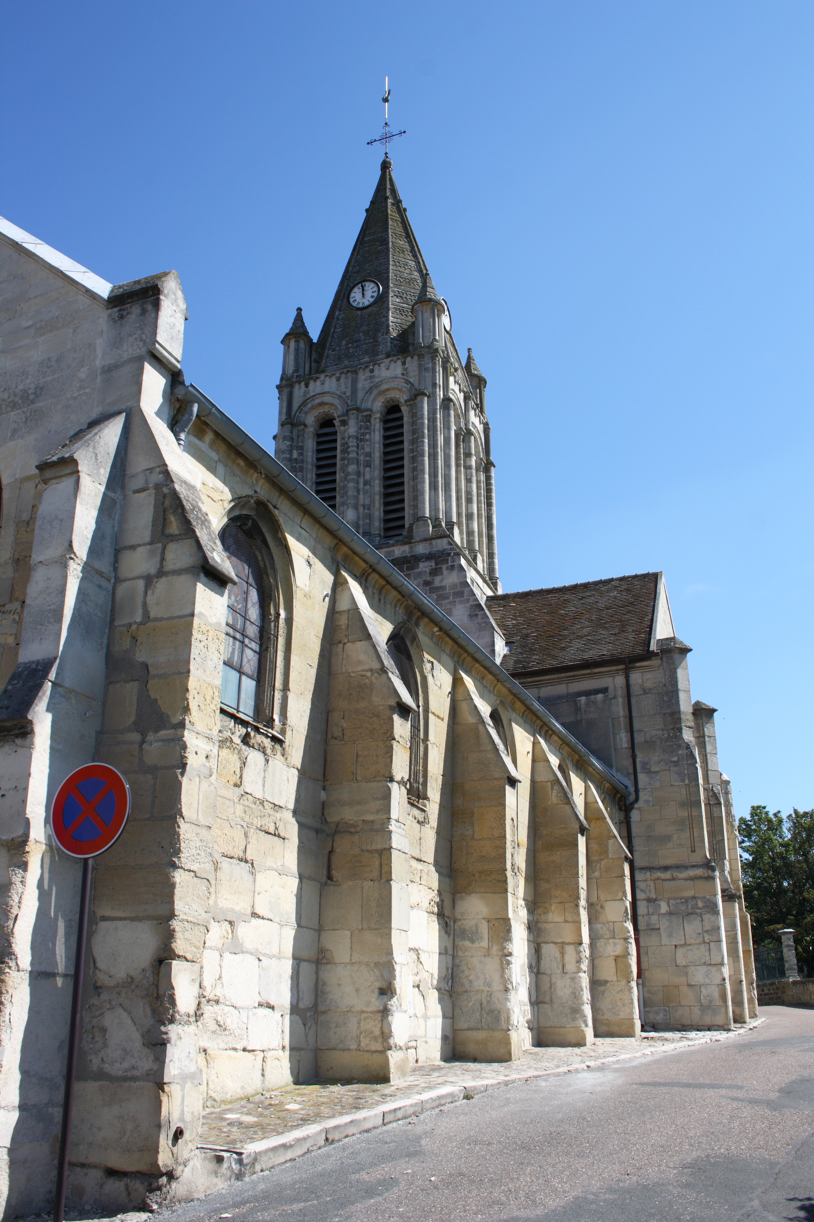 katholische Pfarrkirche Saint-Maclou in Conflans-Sainte-Honorine im Département Yvelines (Île-de-France)